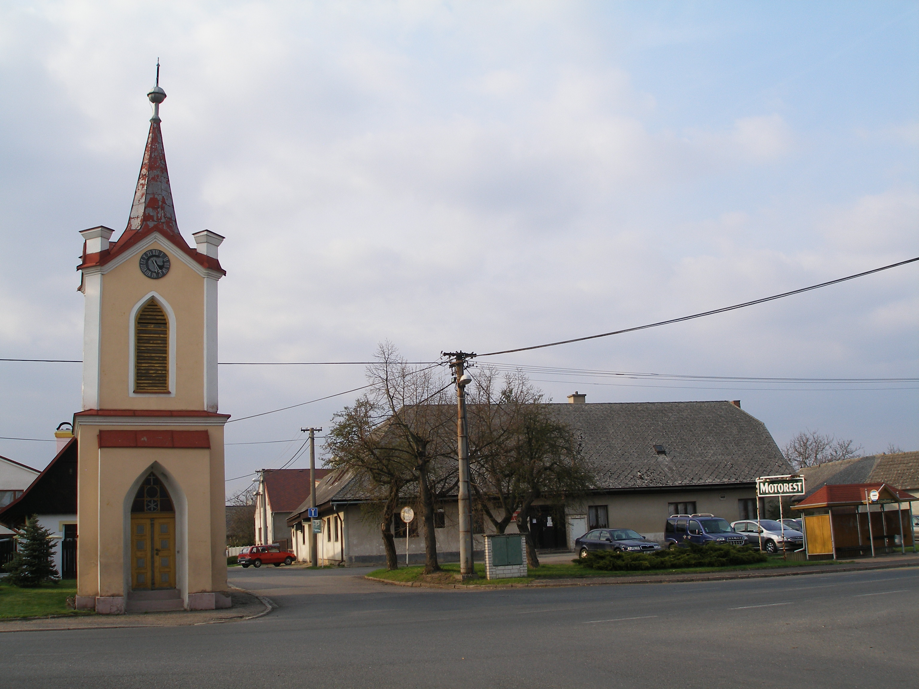 Kaplička v Židněvsi.